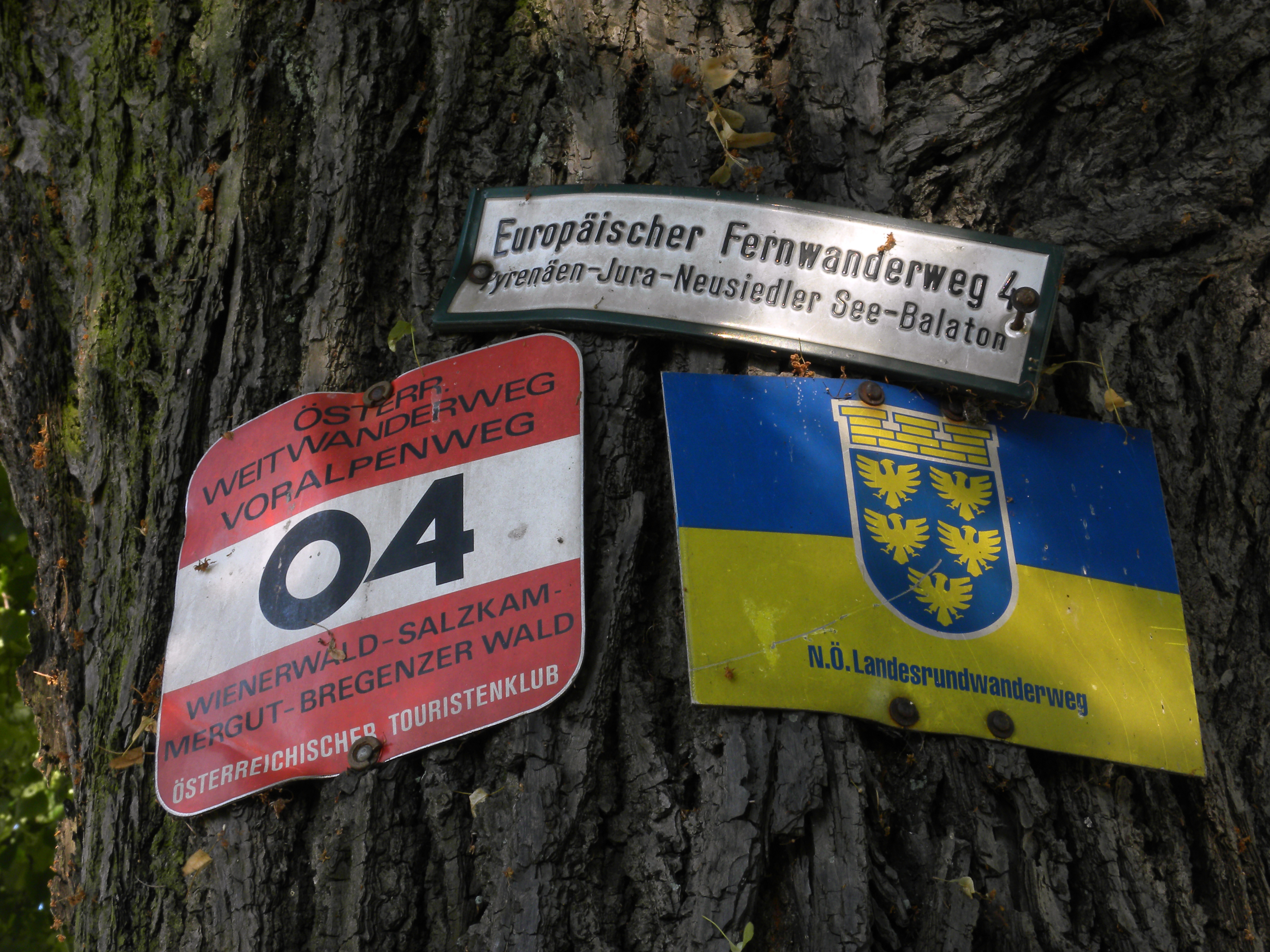 Markierungen des Europäischen Fernwanderwegs 4, des Voralpenwegs und des Niederösterreichischen Landesrundwanderweges